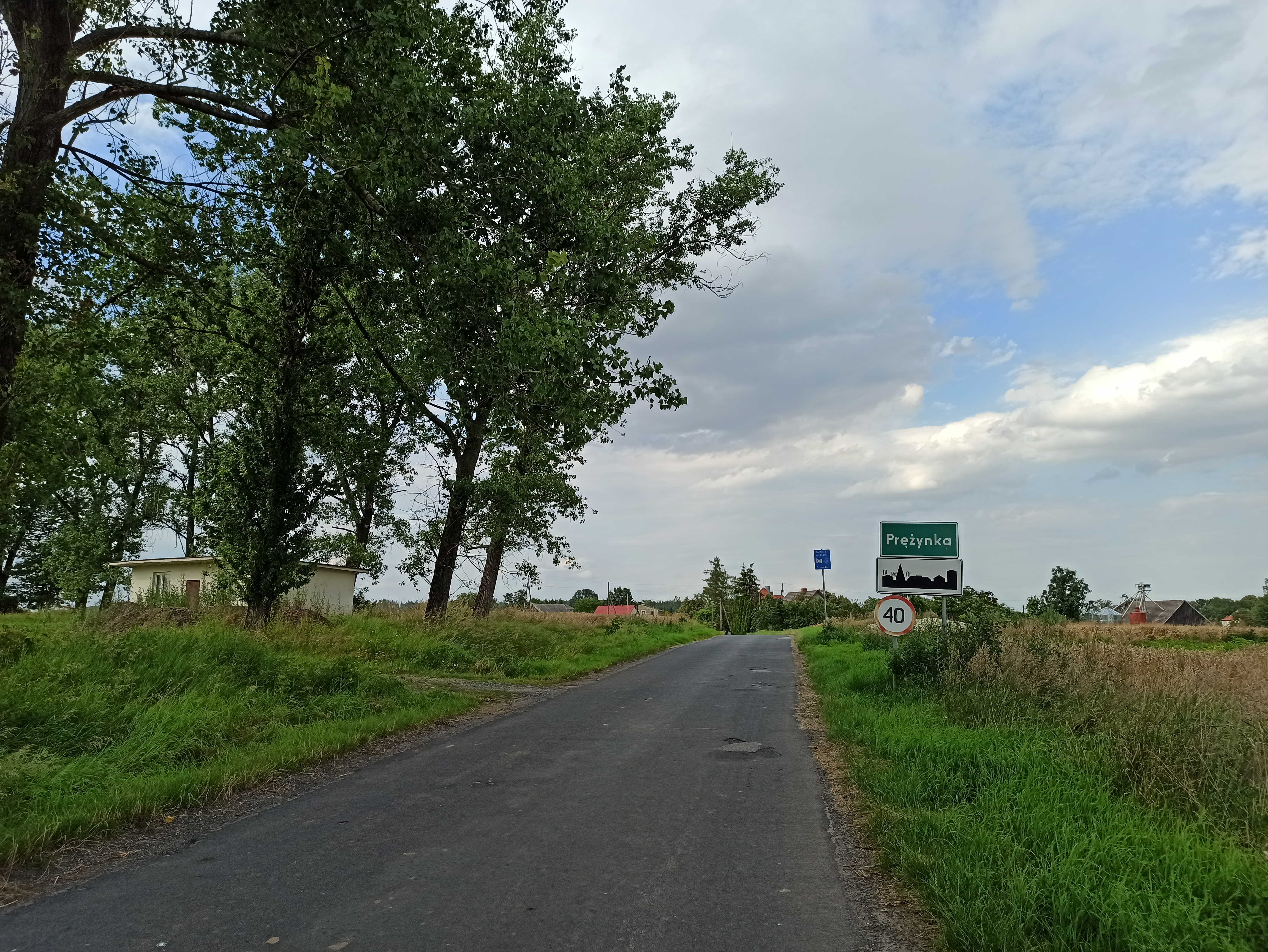 Prężynka – wieś w Polsce położona w województwie opolskim, w powiecie prudnickim, w gminie Lubrza (wjazd od Prudnika).